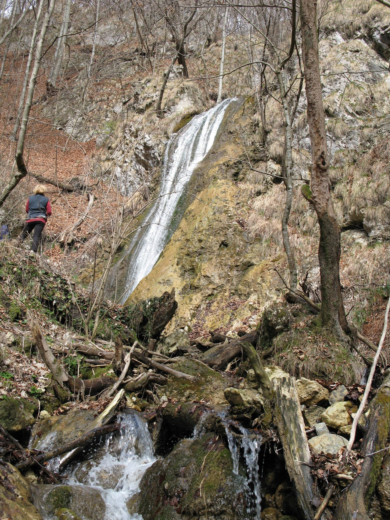 Slap Pekel pod Bohorjem